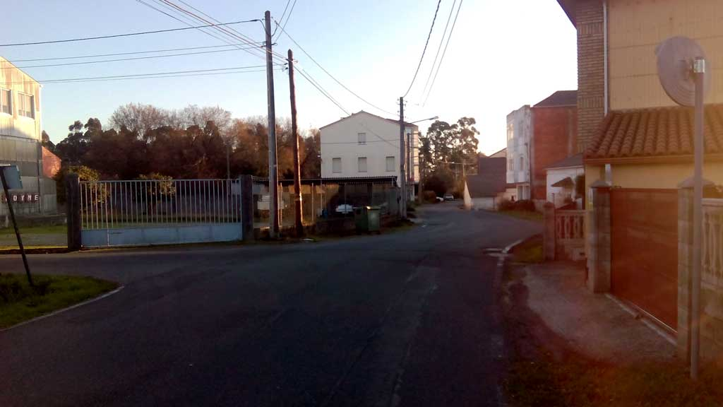 Vista da Revolta, Narón.